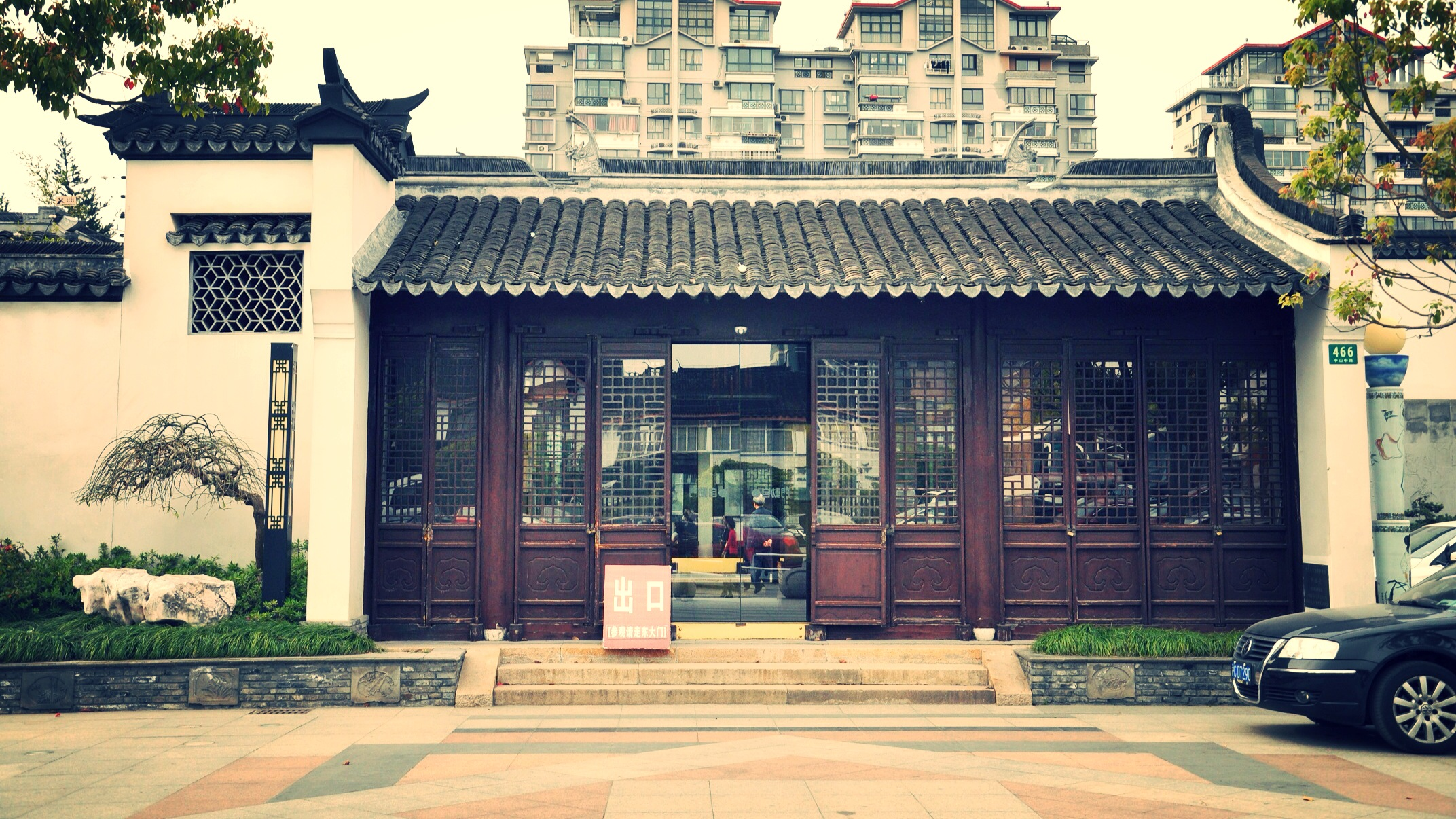 袁昶宅 岳阳街道中山中路458号